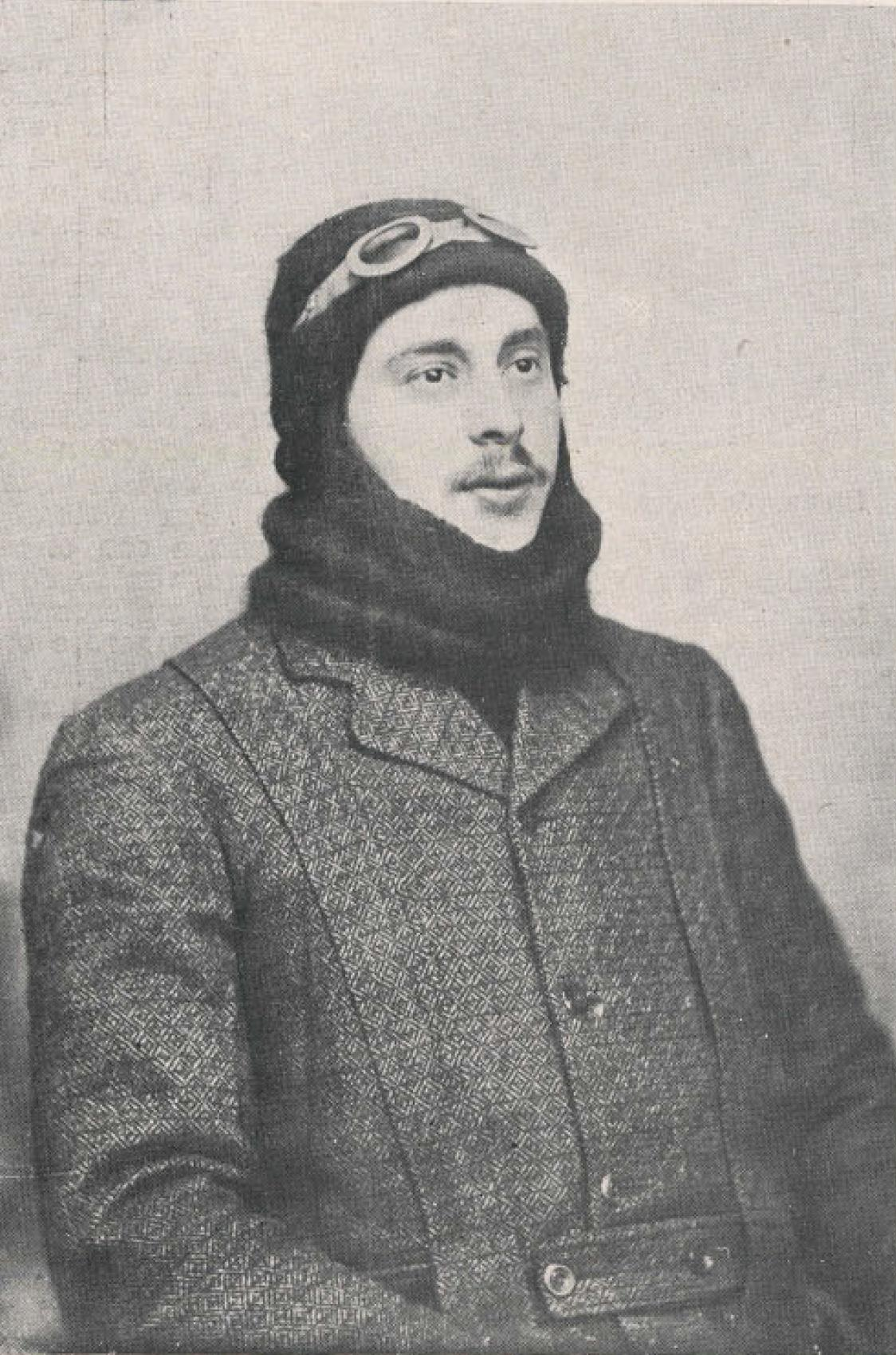 Luis Alberto Acevedo Acevedo (Santiago, 23 de septiembre de 1885 - San Pedro de la Paz, 13 de abril de 1913),1 fue un aviador y ciclista chileno, considerado uno de los pioneros y primer mártir de la aeronáutica de su país.